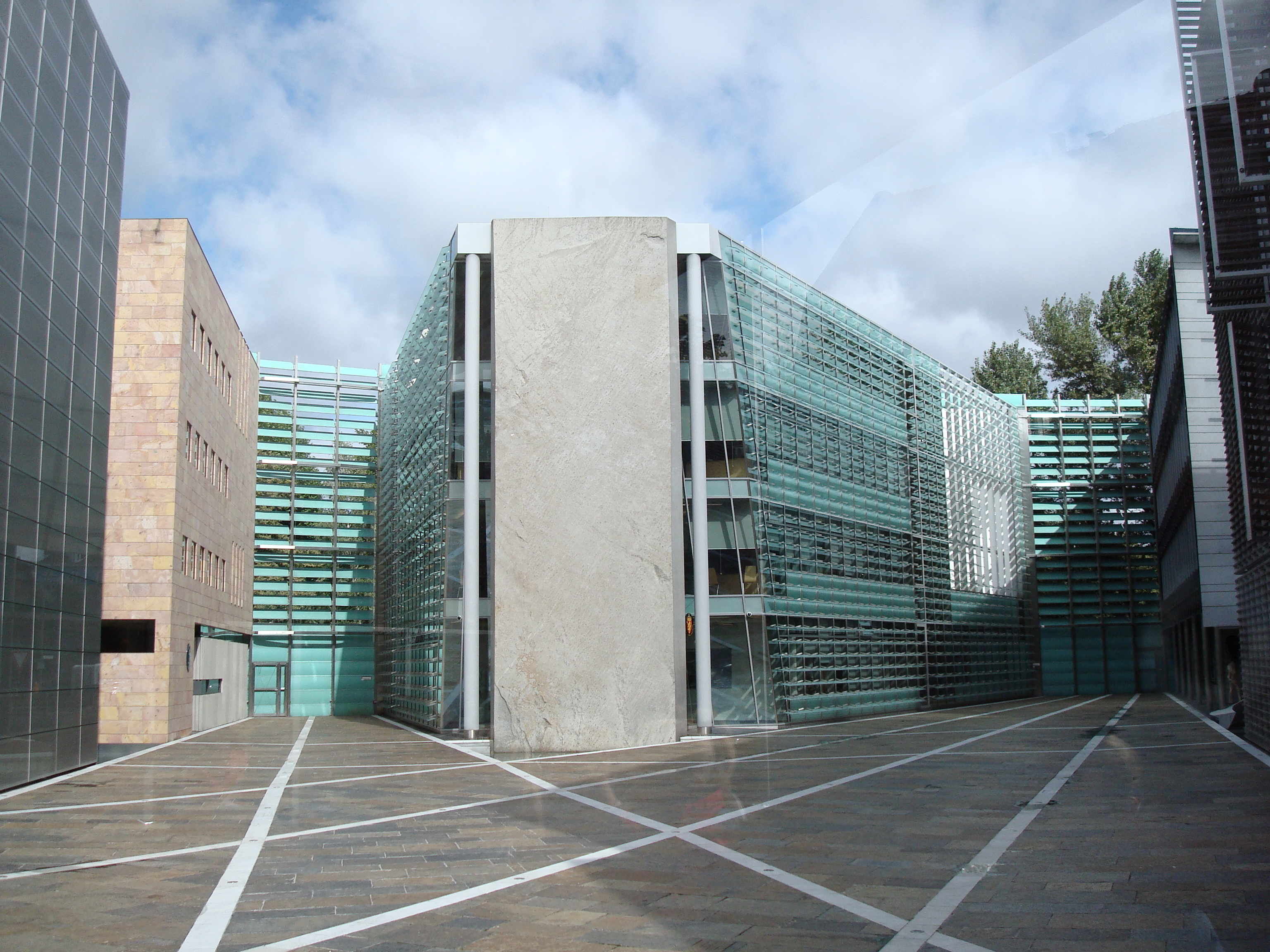 Norges byggnad i de nordiska ambassaderna.